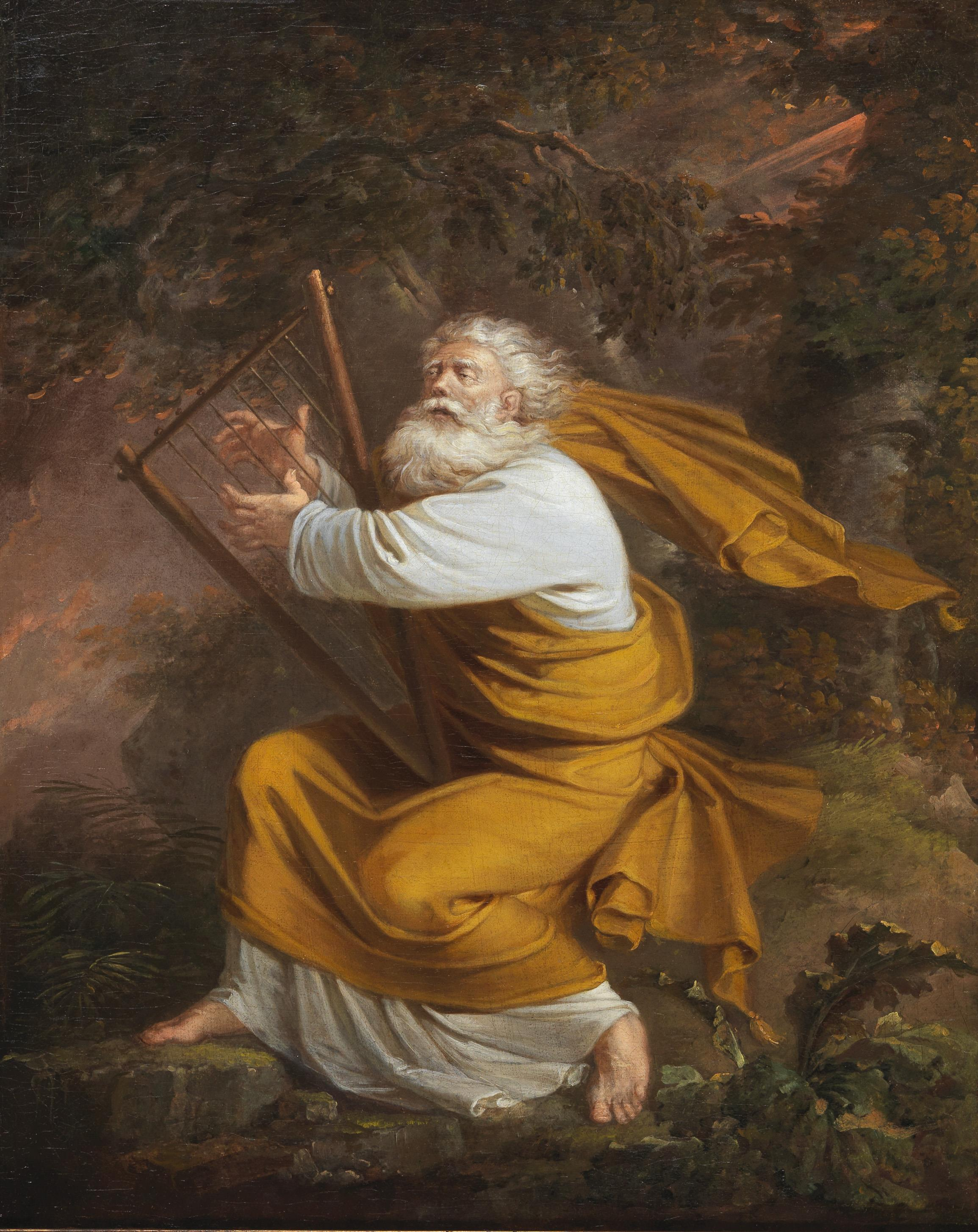 König David, rückseitig bezeichnet "gemalt im October 1819 von Professor Schindler. Wien", Öl auf Leinwand auf Karton, 60,5 x 48,5 cm